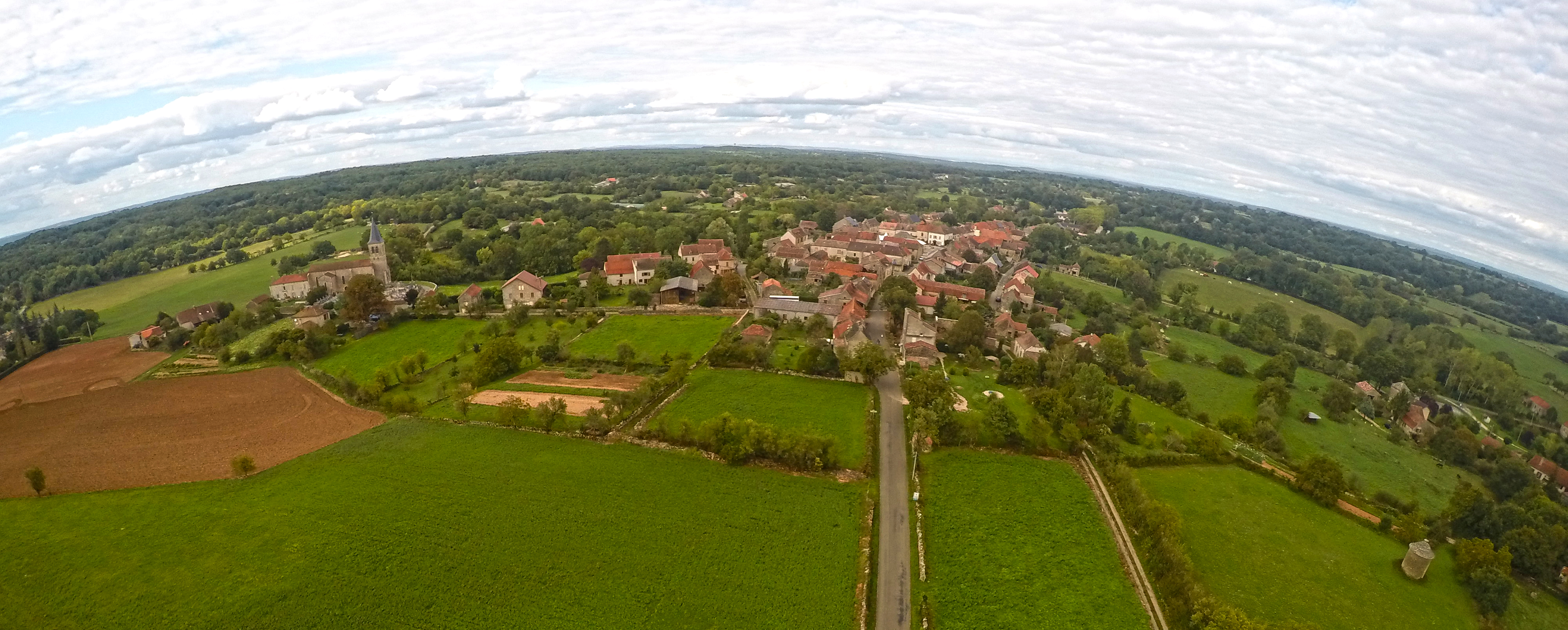 Vue aérienne du village de Beauregard